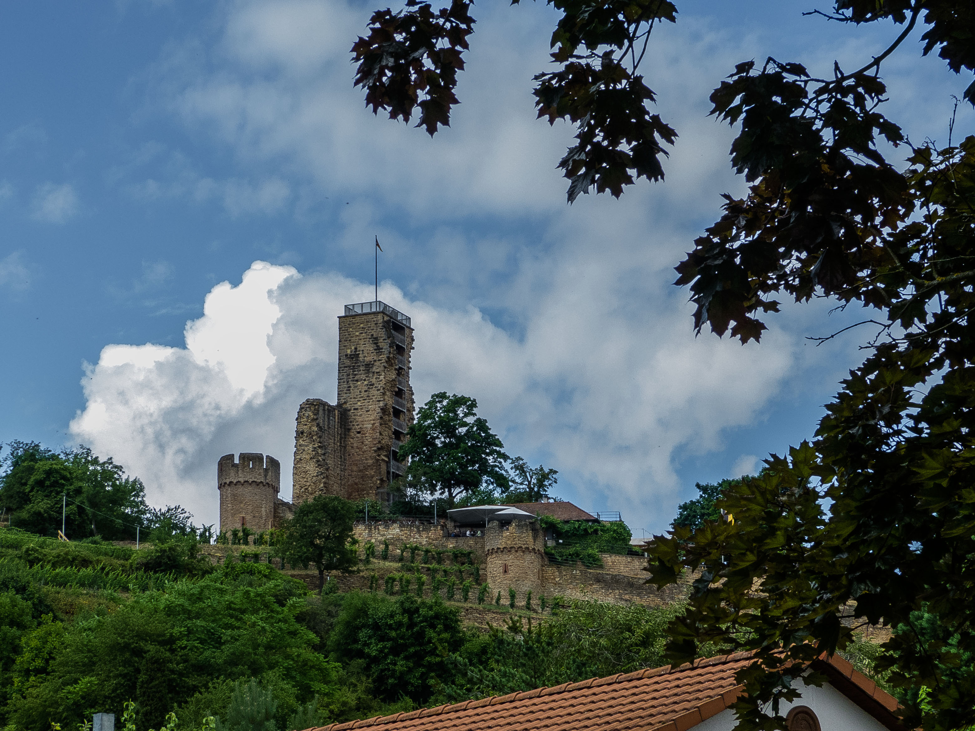 Burgruine Wachtenburg, stammt aus der Zeit der Staufer